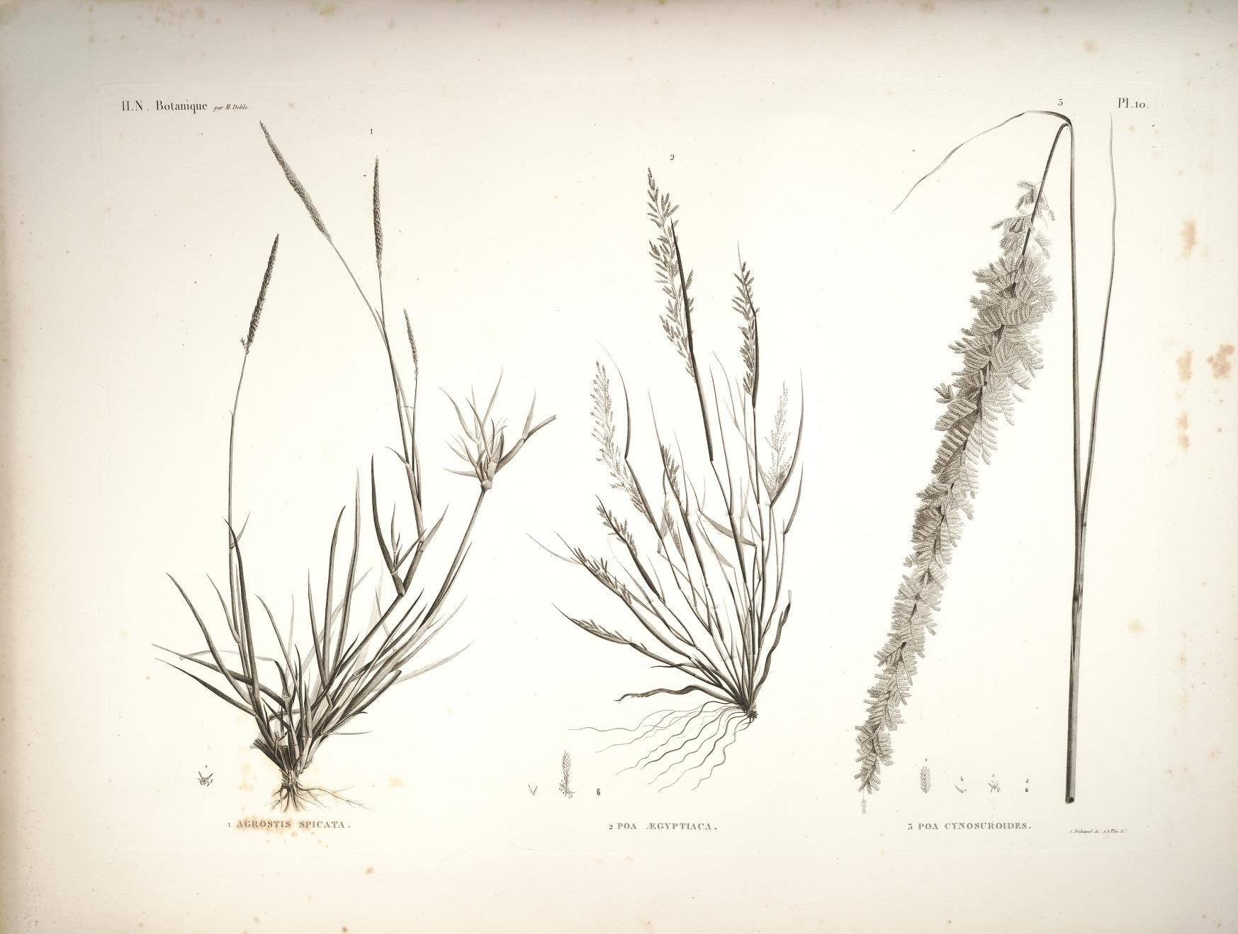 . y N / H.N . BolaiiK